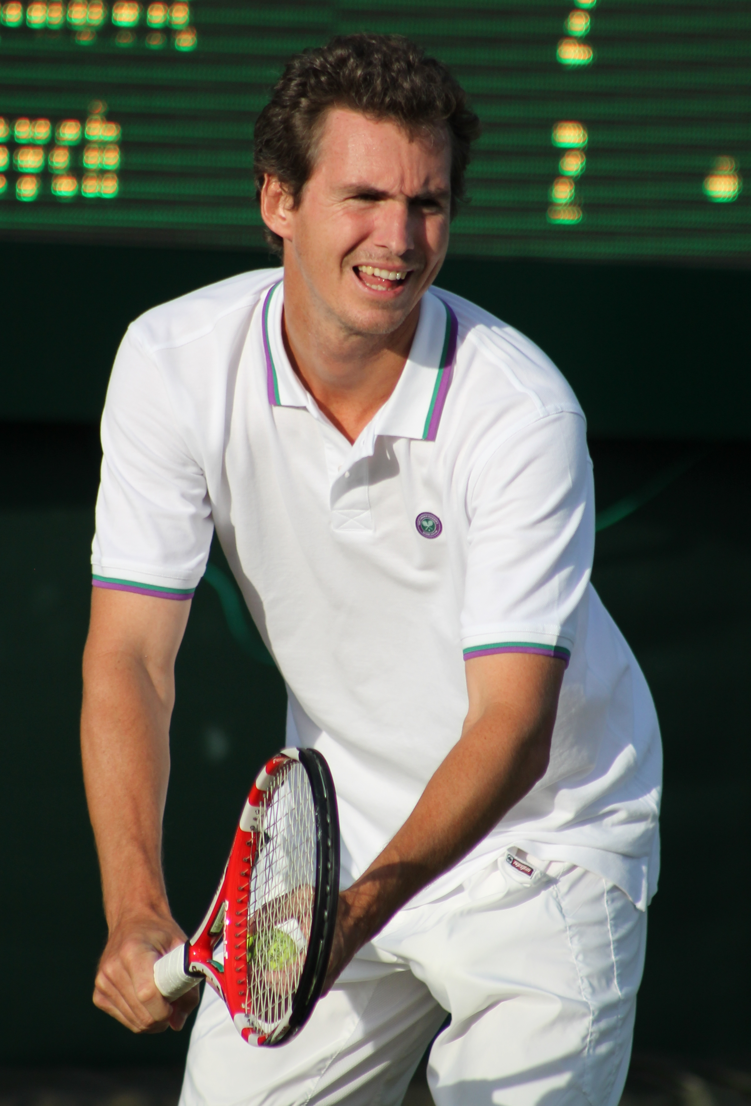 Hernych WMQ14 (21)